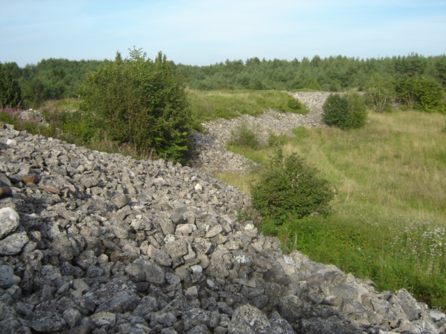 Valjala Maalinna kivised nõlvad